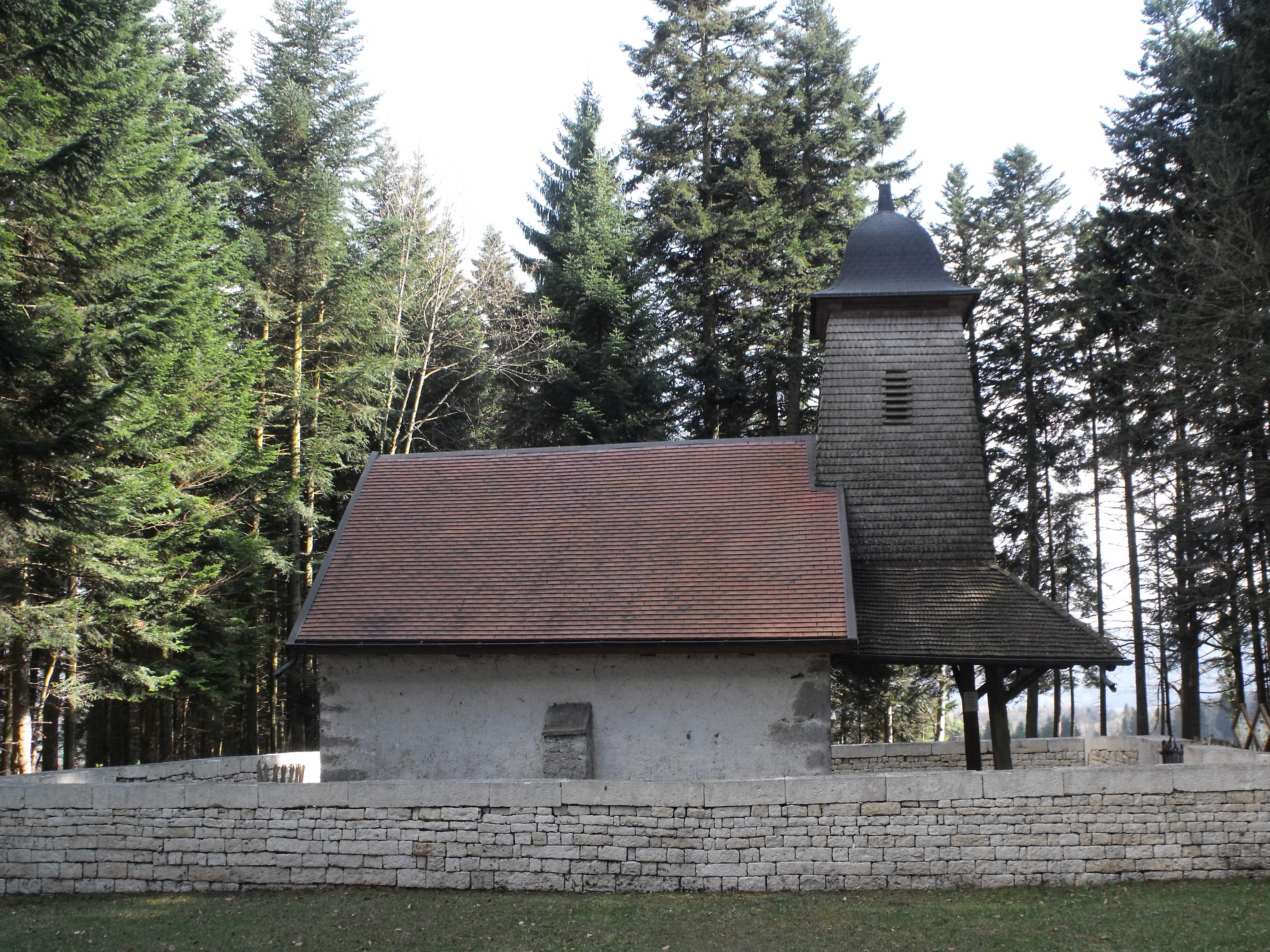 Chapelle Saint-Roch d'Urtière, Doubs, France